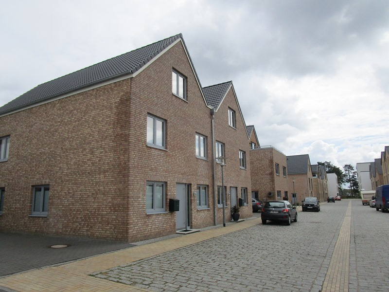 Slesvig-Friheden